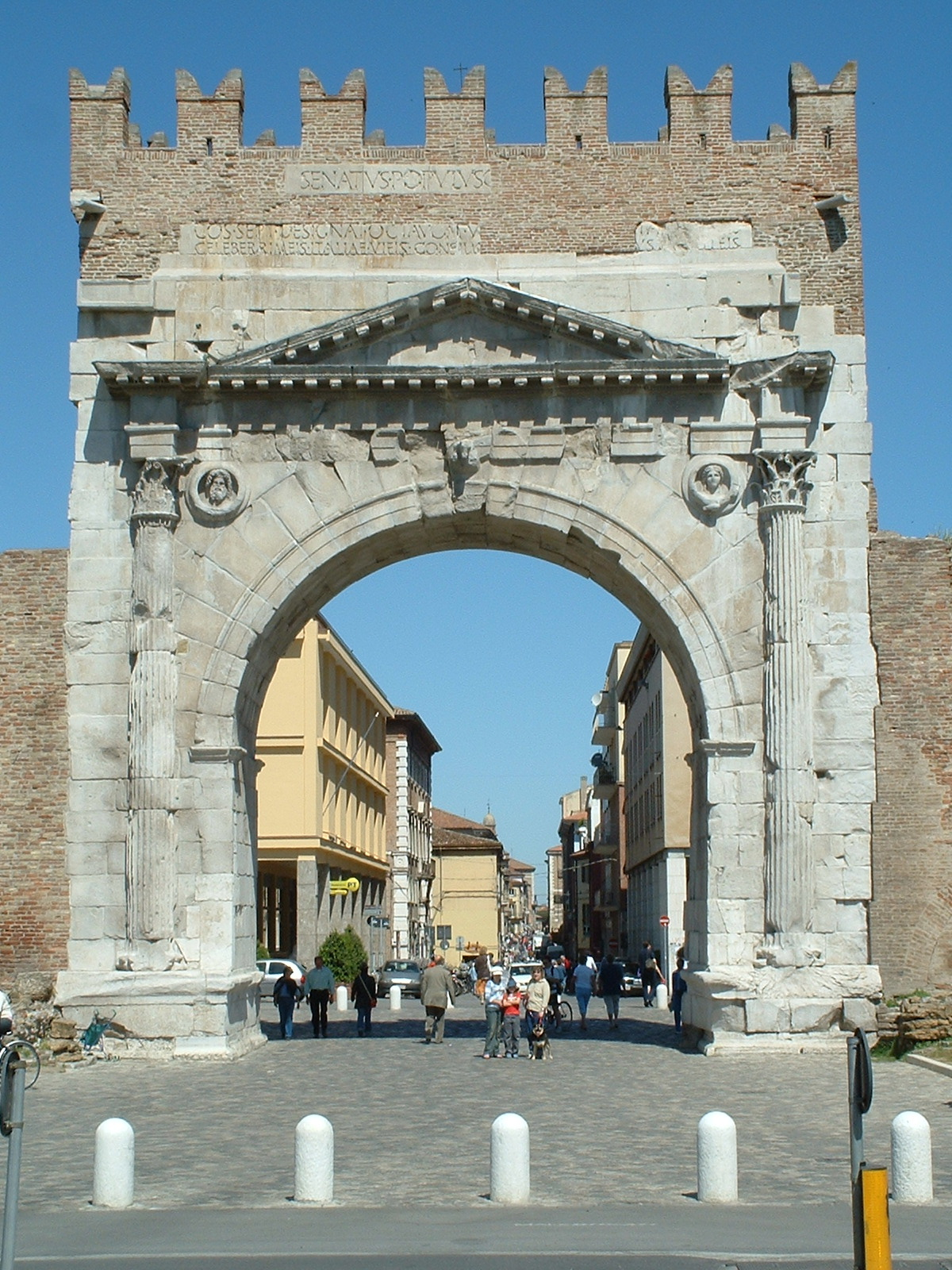 römischer Triumpfbogen zu Ehren von Kaiser Augustus in Rimini am Corso d´Augusto, welcher von hier über Piazza Tre Martyri und Piazza Gavour zur Ponte di Tibero (erbaut 14 n.Chr.)führt.